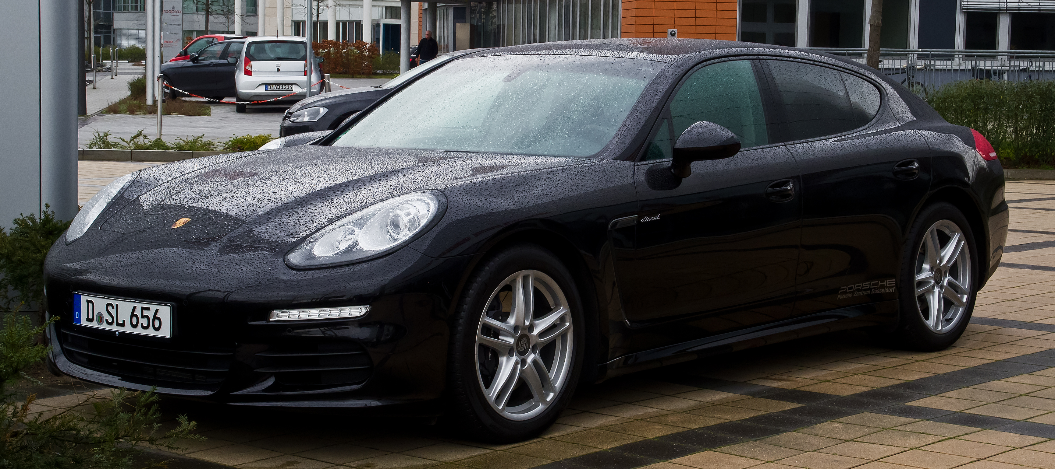 Porsche Panamera Diesel (970, Facelift)